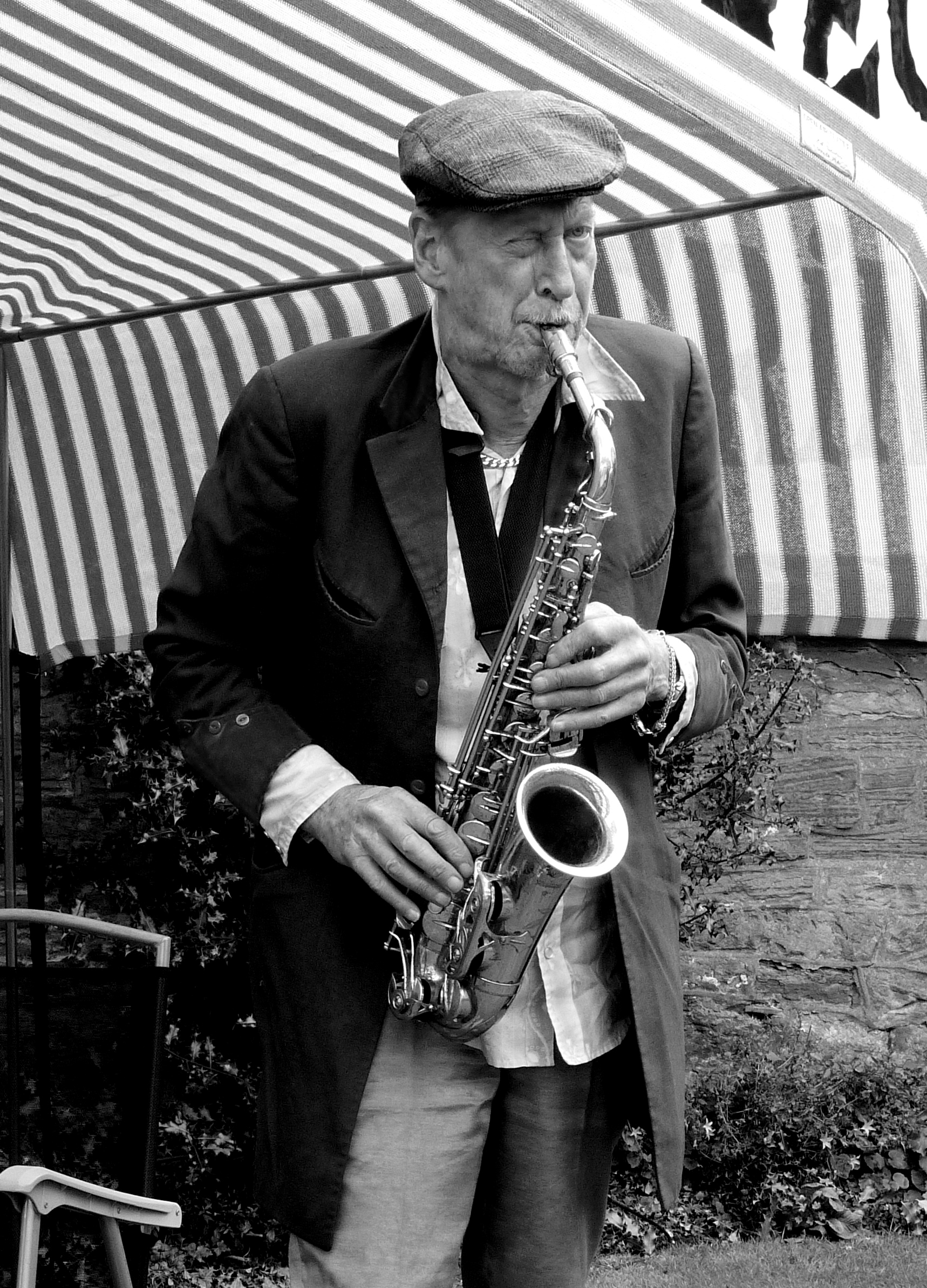 Nik Turner 14-08-2011